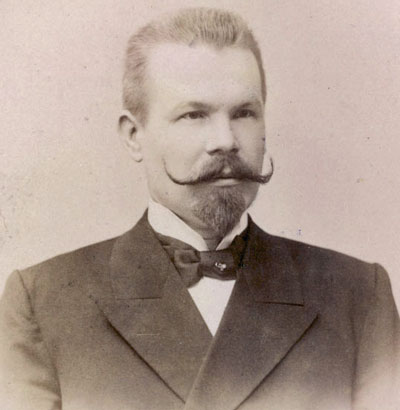 Андерс Невалайнен (1858-1933), ювелир фирмы Фаберже